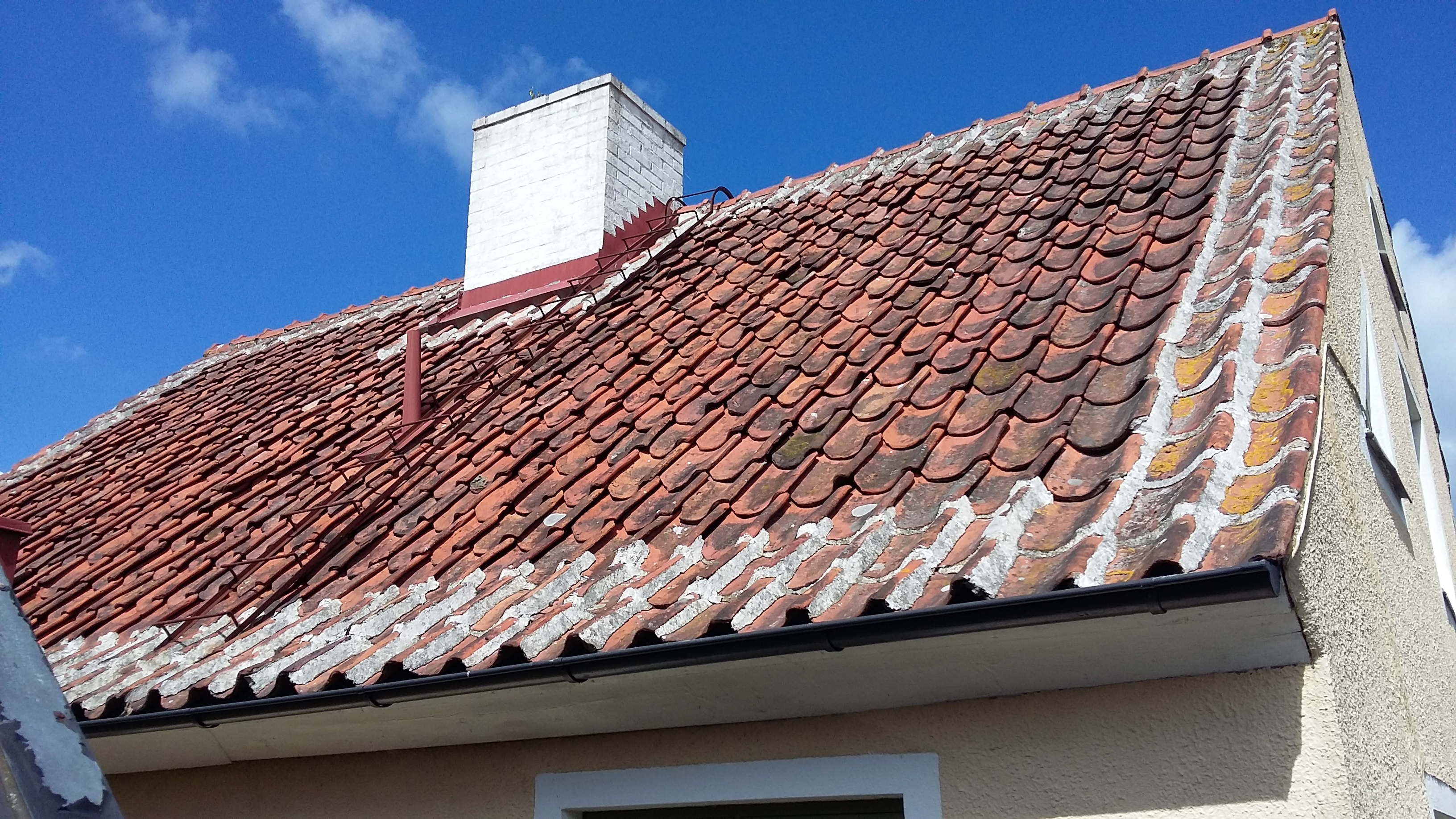 Skällningar på tak i Simrishamn 2016